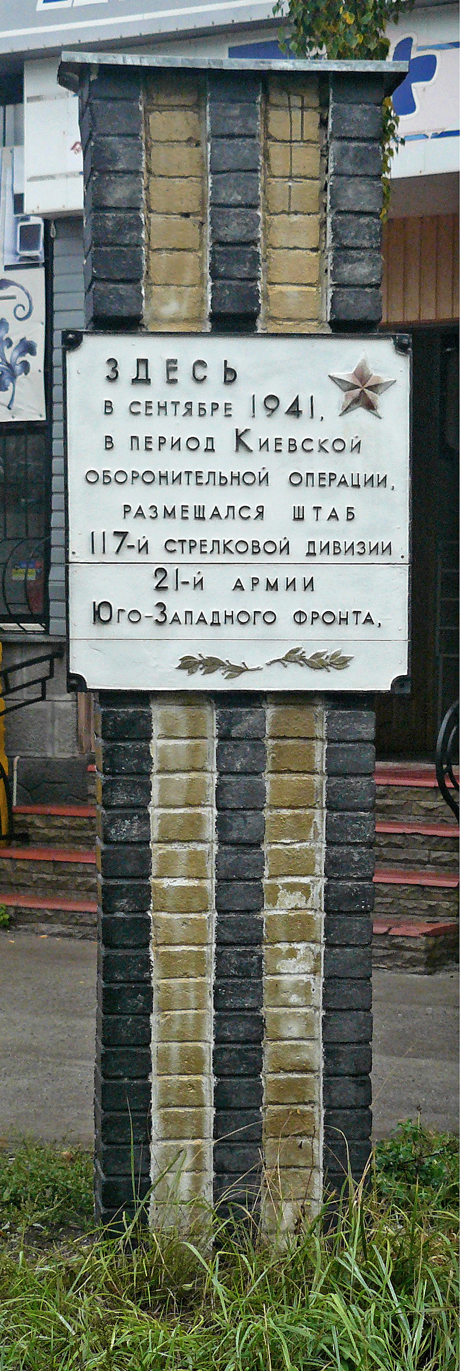 Місце розташування штабу 117-ої стрілецької дивізії у вересні 1941 року. вул., Цибаня 2А, колишня територія цегельного заводу